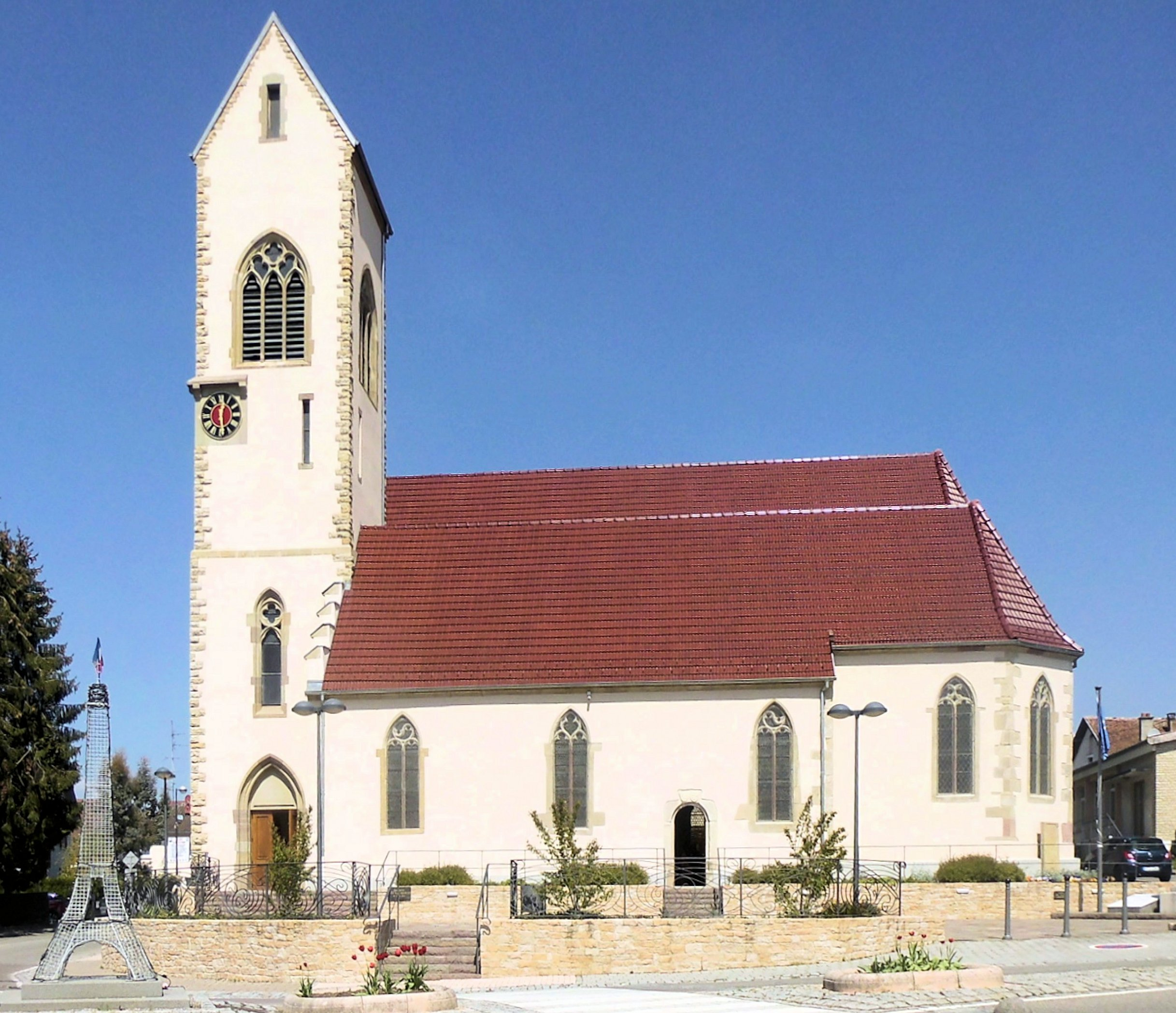 L'église Saints-Pierre-et-Paul de Waldighofen, côté sud